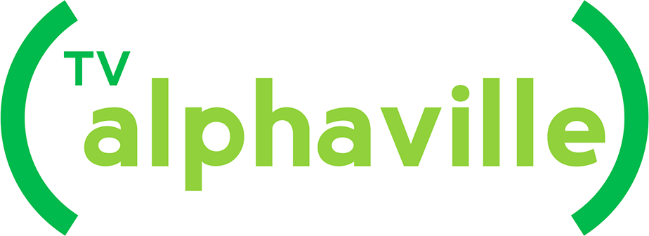 Logotipo da empresa de televisão por assinatura brasileira TV Alphaville.